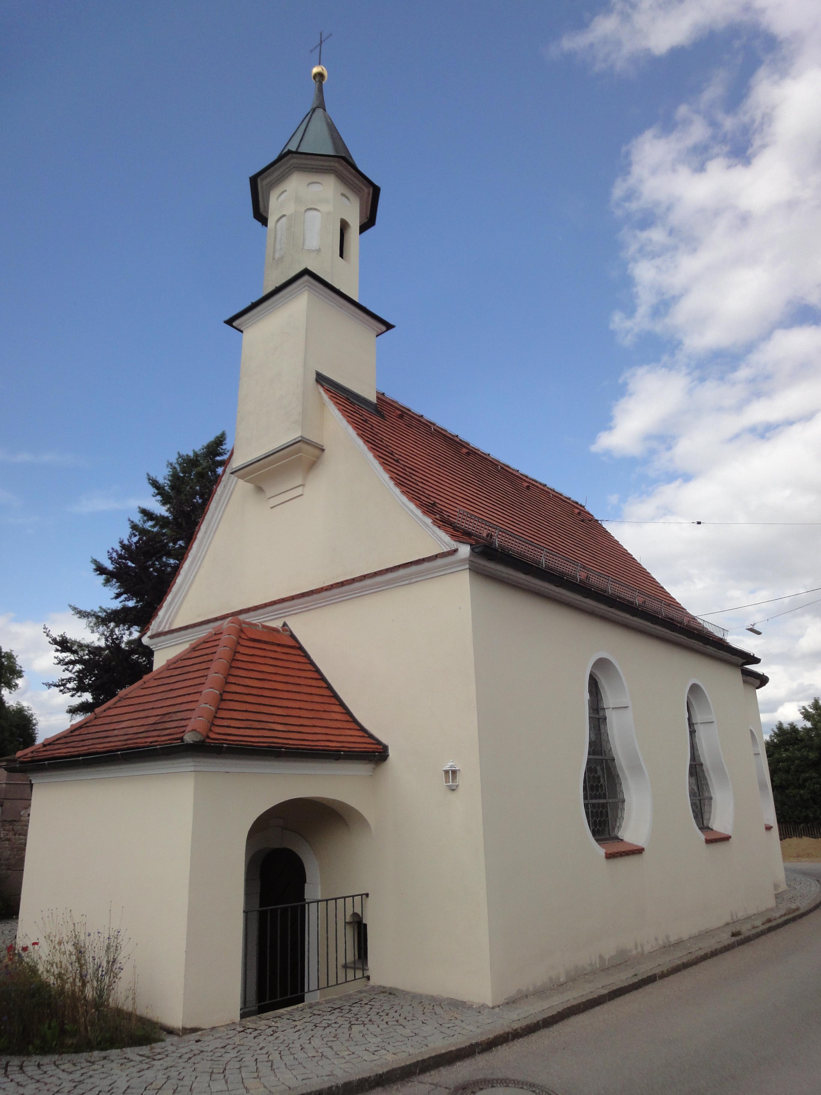 St. Sebastian Kapelle, Gersthofen-Batzenhofen, am Friedhof